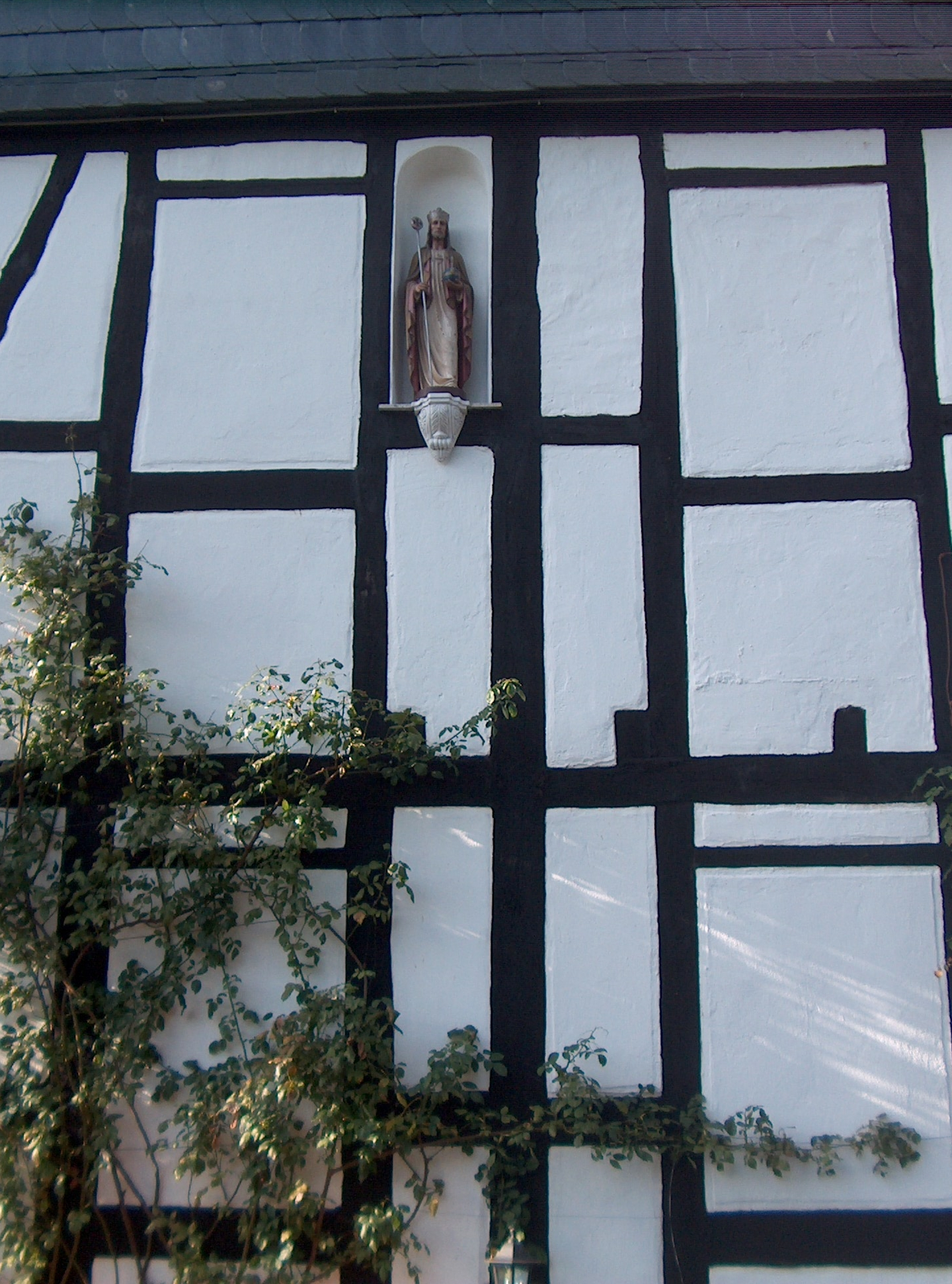 Gaststätte Backes in Halft, Ostseite